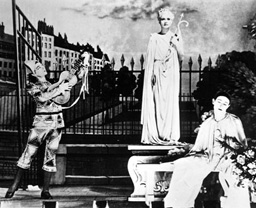 capture d'écran de "Les enfants du Paradis" 1945 films